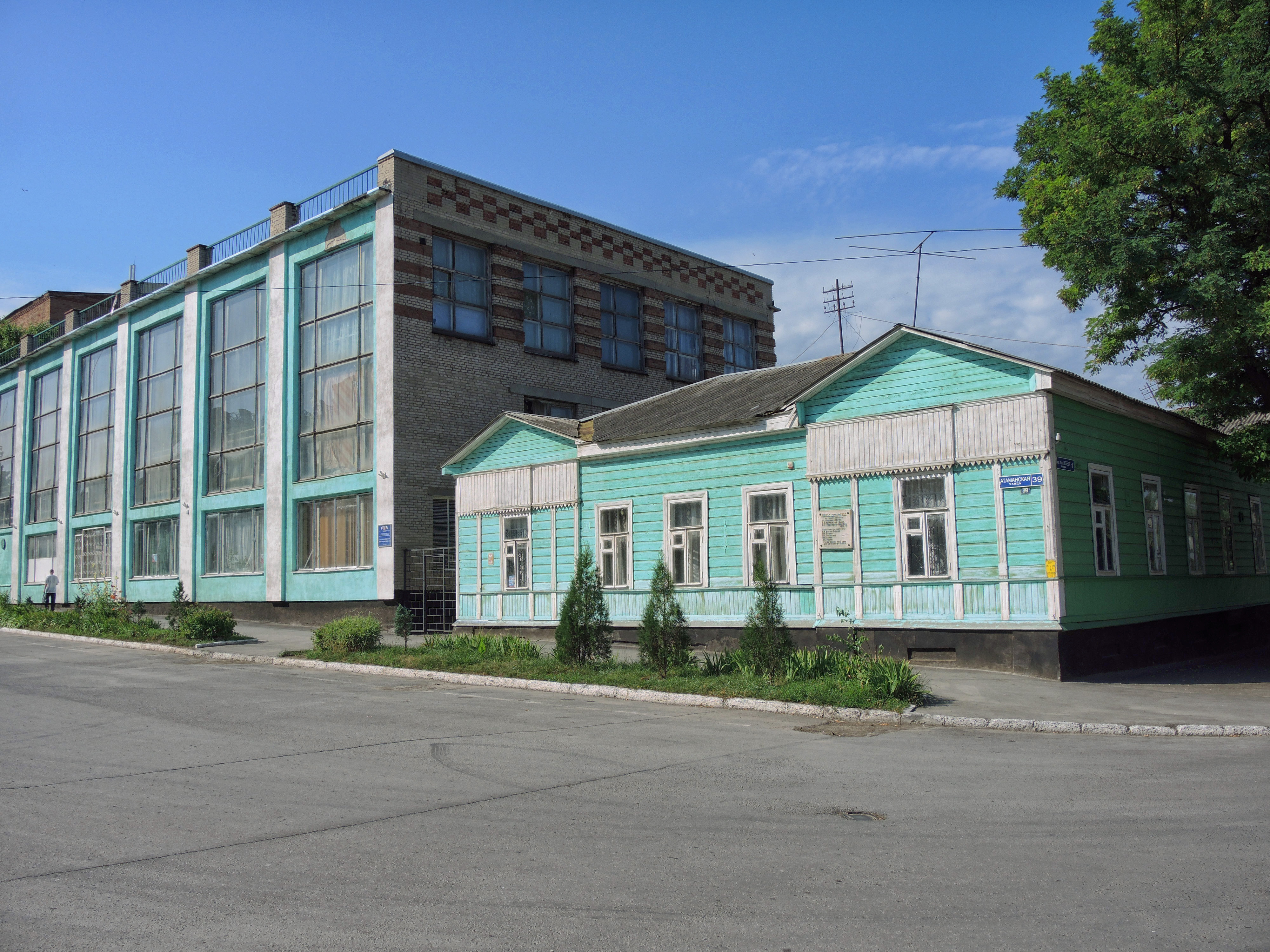 Здание почтовой станции, здесь останавливались А.С. Пушкин и М.Ю. Лермонтов: улица Советская, 39, Новочеркасск, Ростовская область